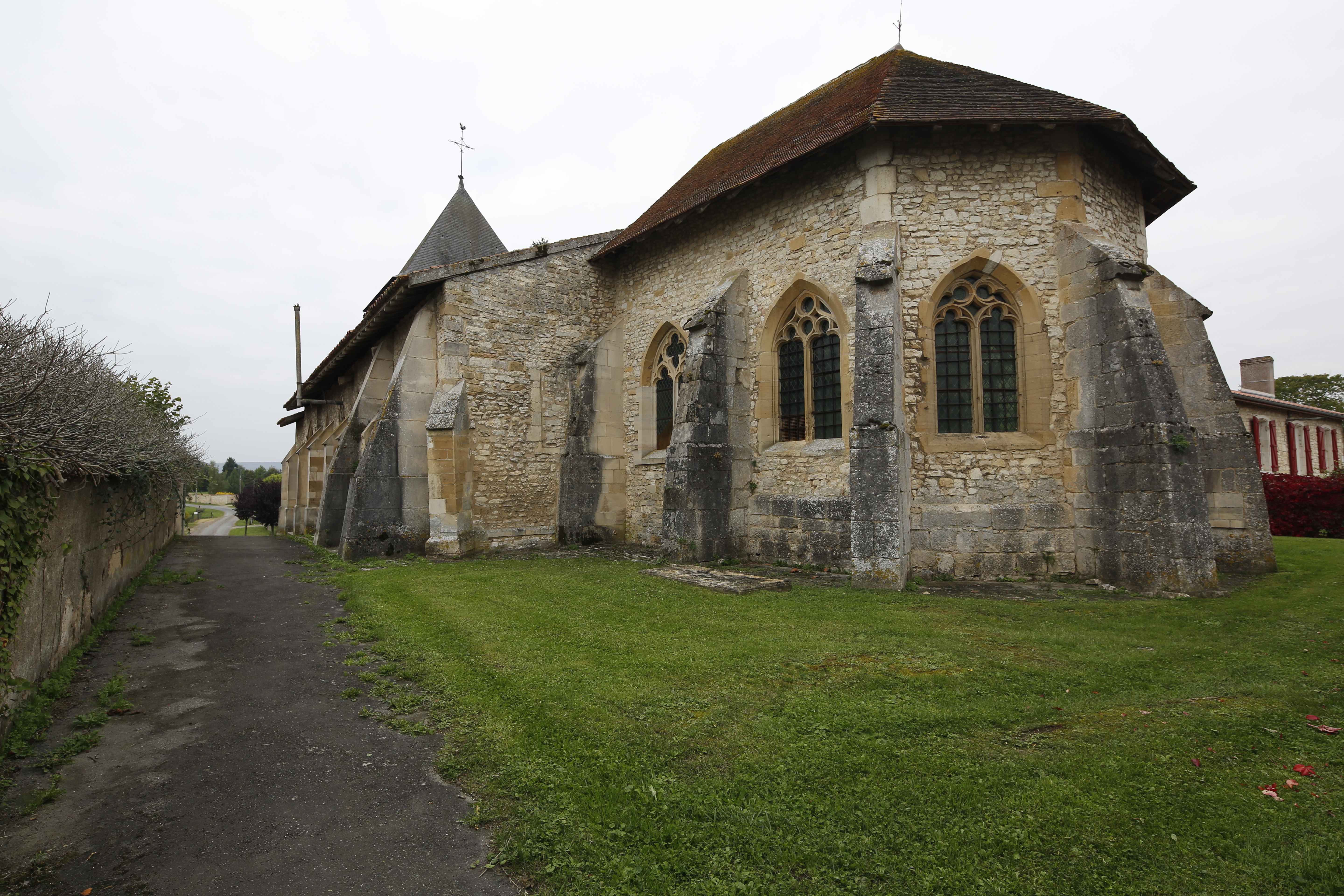 Église Saint-Gorgon de Woël.